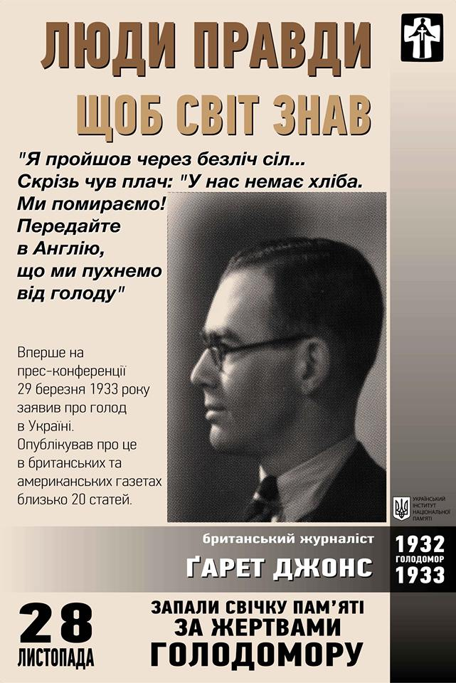 Люди Правди. Серія плакатів про тих, хто, ризикуючи кар’єрою, свободою або навіть життям, зробили все, щоб зберегти та поширити правдиві відомості про Голодомор. Щоб світ знав.